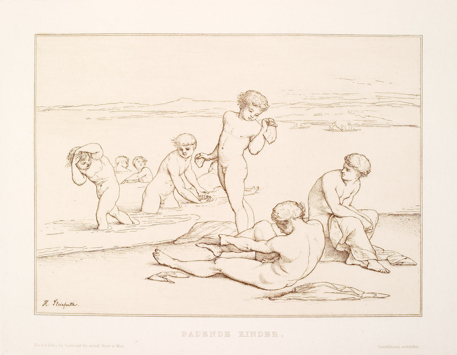 Hermann Steinfurth - Heliographische Reproduktion der Zeichnung Badende Kinder von Hermann Steinfurth